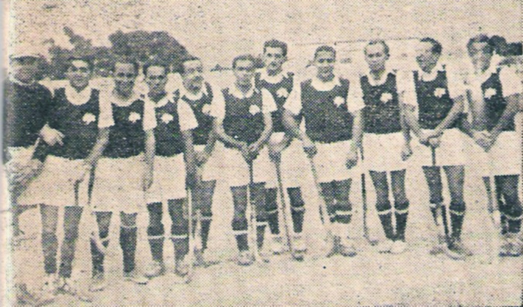 Η ομάδα χόκει του Παναθηναϊκού τη δεκαετία του 1930. Αποστολίδης (τερμ.), Κϊμων Ζάχος, Παντελίδης, Αναστασίου, Δημητράκος, Μπούκας, Αγγ. Φιλίππου (αρχηγός), Κλέων Ζάχος, Νικ. Ματζάρογλου, Καμπουράκης και Λίτσας.